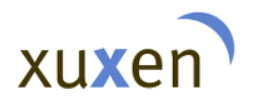 Xuxen zuzentzaile ortografikoaren logoa